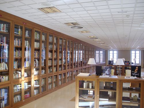 Vista de la Sala César Antonio Molina y Mercedes Monmany en la Biblioteca Provincial de la Diputación de A Coruña